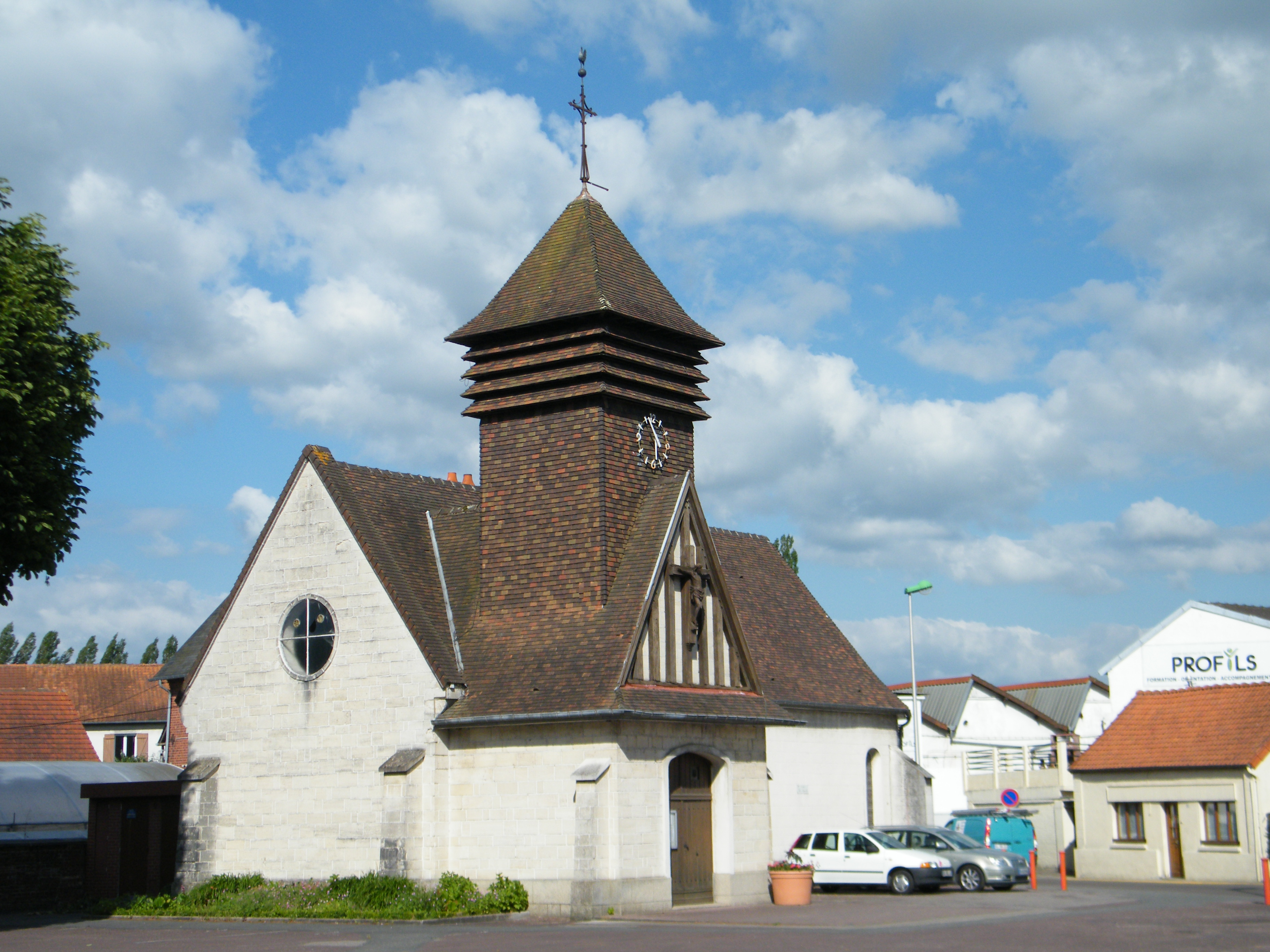 L'église.